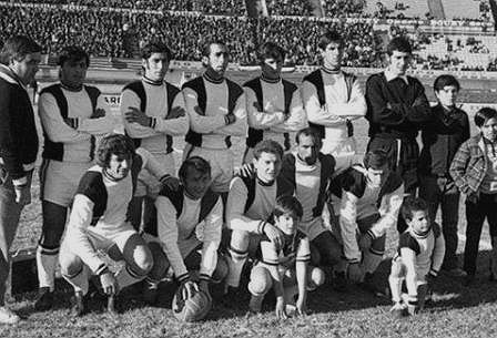 Temporada 1971 en Primera División